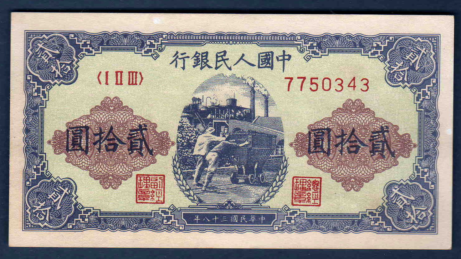 中国人民銀行が中華民国38年に発行した20元紙幣